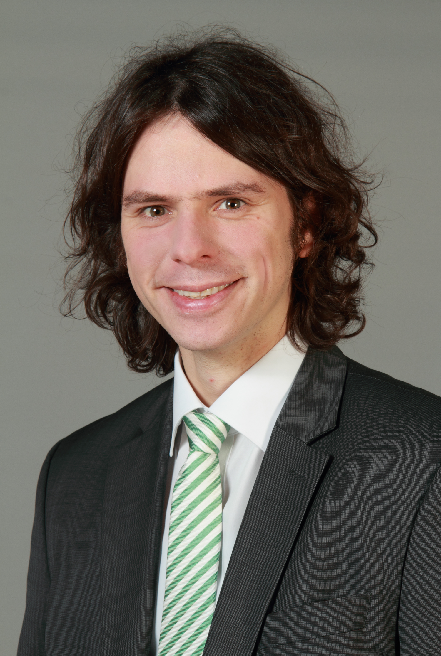 LandtagsabgeordneteR NRW